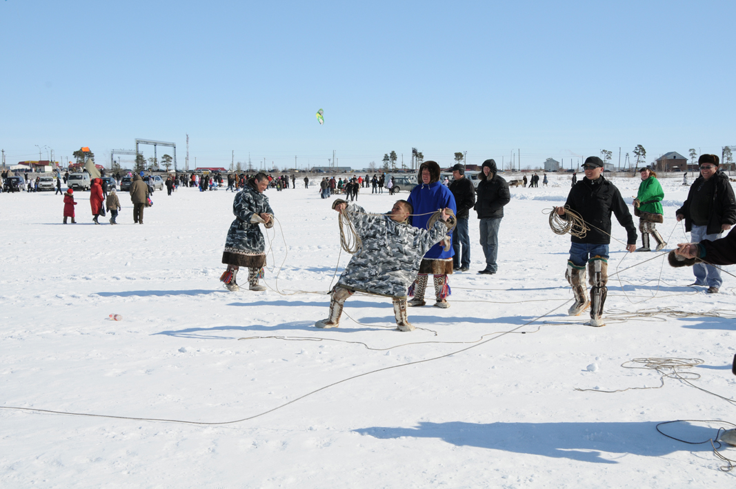 Сelebration "Day of Herders", Празднование "День оленевода"